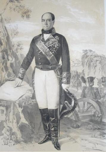 retrato del general José Santos de la Hera y de la Puente, Primer conde de Valmaseda